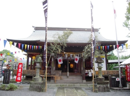 疋野神社（熊本県玉名市）